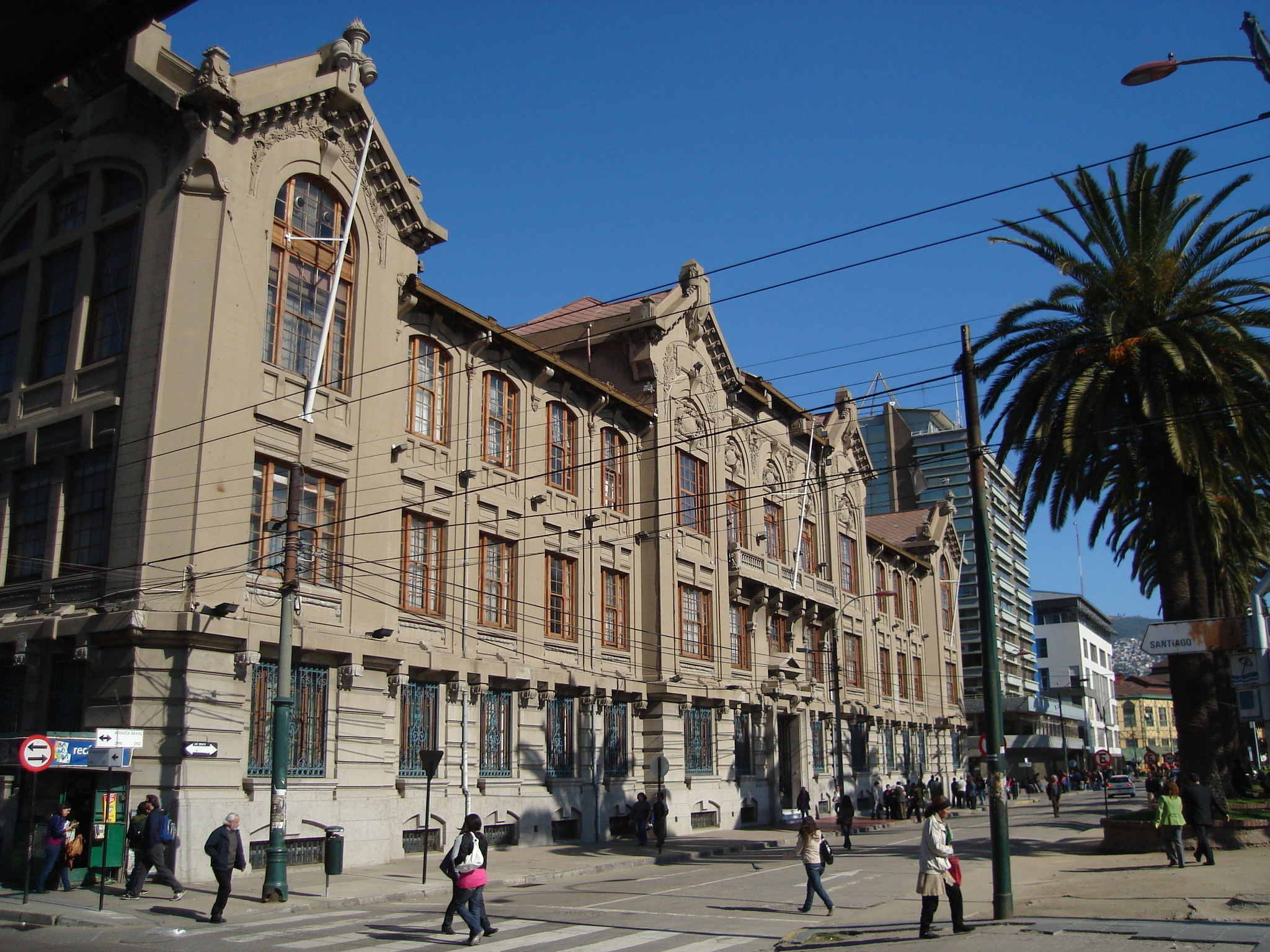 Casa Central de la Universidad Católica de Valparaíso This is a photo of a national monument in Chile: 575